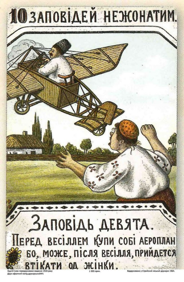 Василий Гулак. Десять заповедей нежонатым (на суржике). Открытка 9 - "Перед весиллем [свадьбой] купи соби аероплан..."